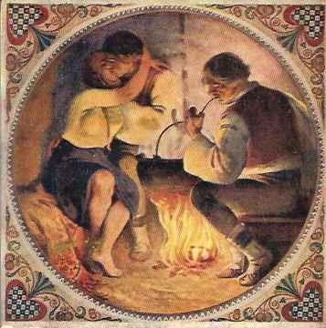 Česky: Valašské kroje